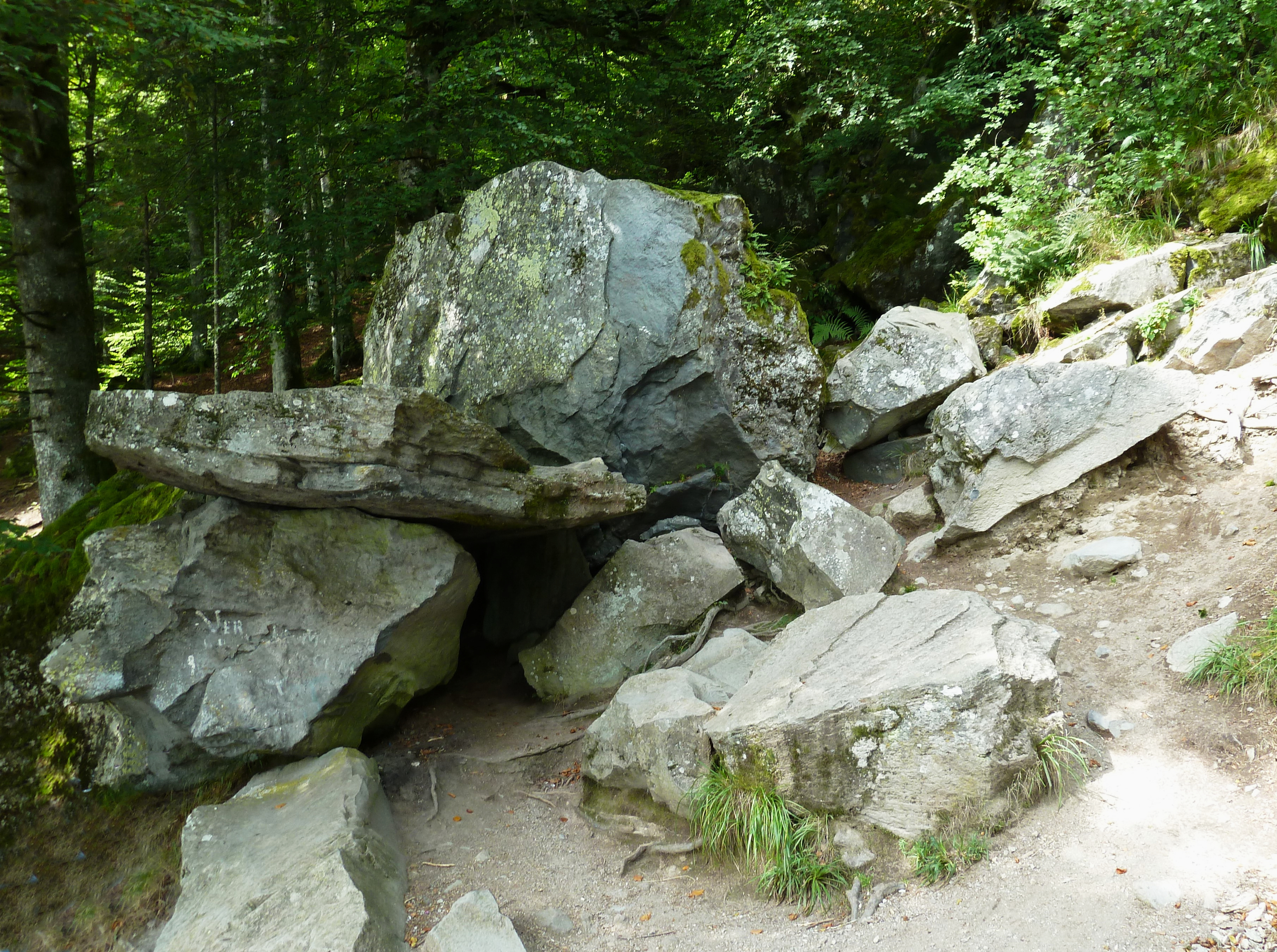 Le dolmen, Allée sous bois (Rive Ouest) du Lac_Pavin, Puy-de-Dôme.- (Auvergne).- France.